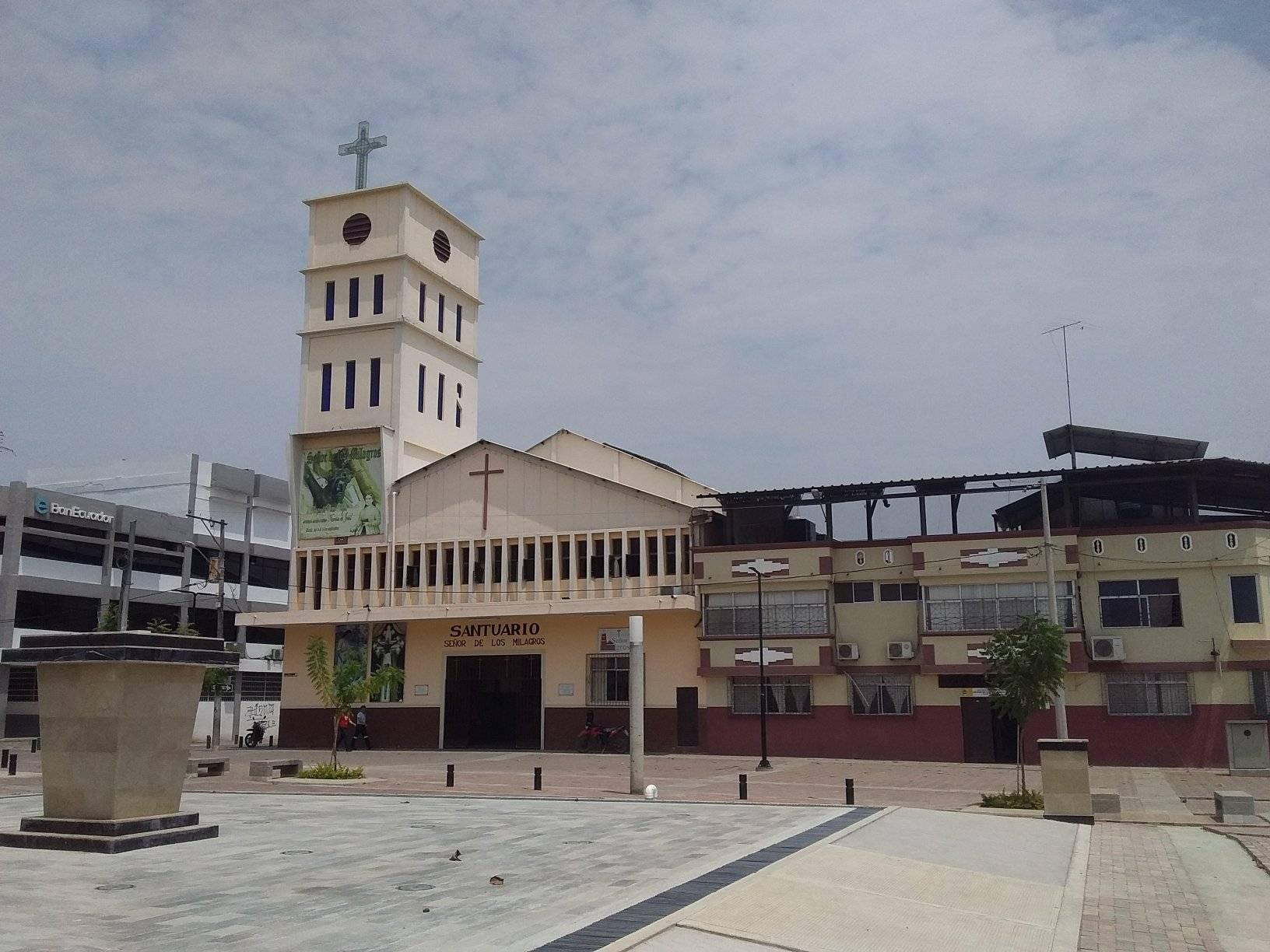 Santuario del Señor de los Milagros.